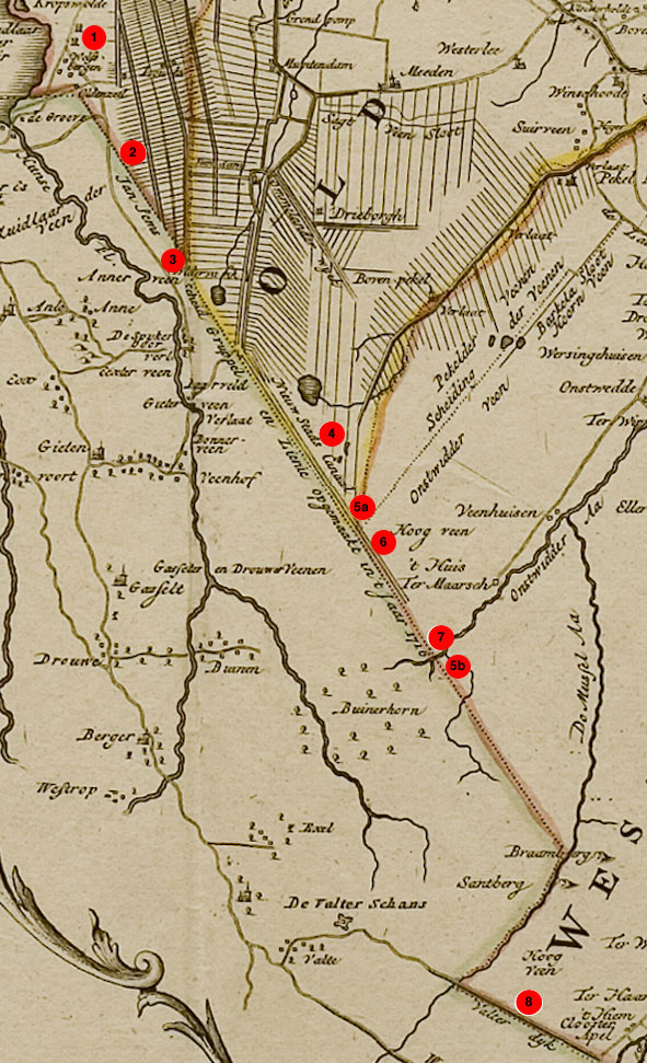 "Kaart der provintie van Groningen en Ommelanden: mitsgaders de Heerlijkheid Westerwolde", detail met de Semslinie door mij bewerkt met het aangeven, bij benadering, van de objecten van de Semslinie Kunstlijn anno 2010